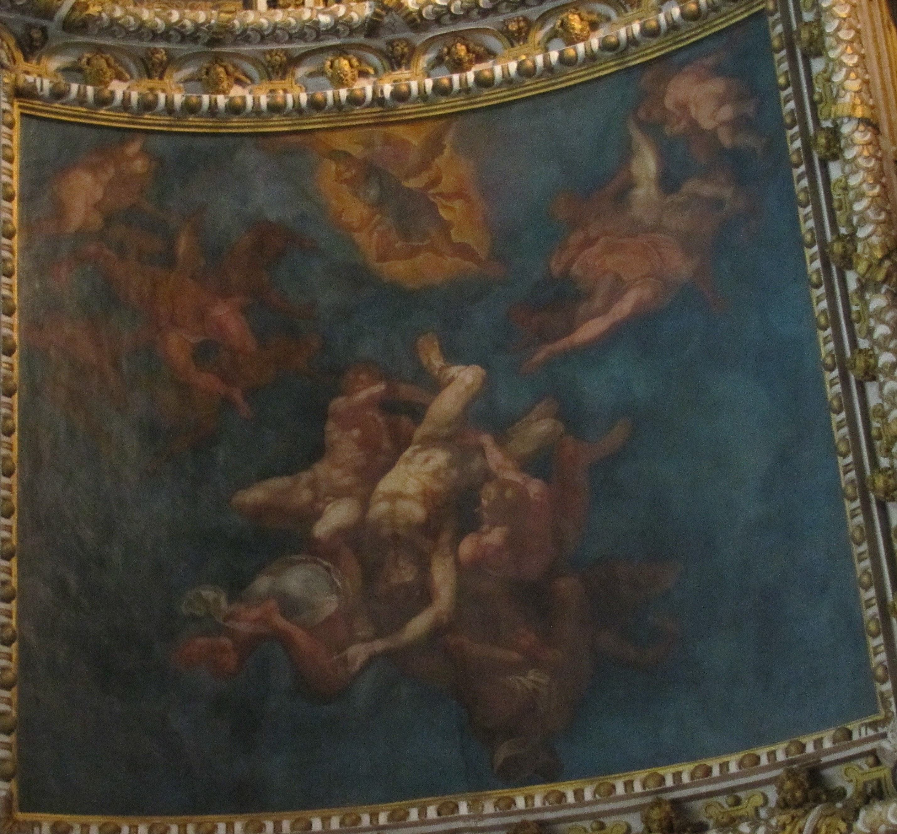 Martin Fréminet, La Chute des anges rebelles, 1608 - 1619, Fontainebleau, musée national du château.